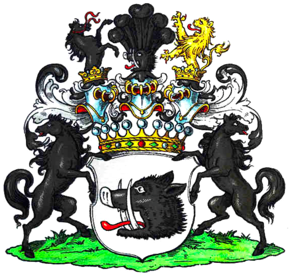 Wappen der Grafen von Hardenberg